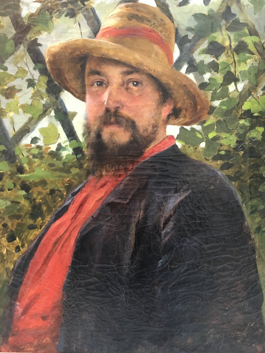 Portrait d'homme